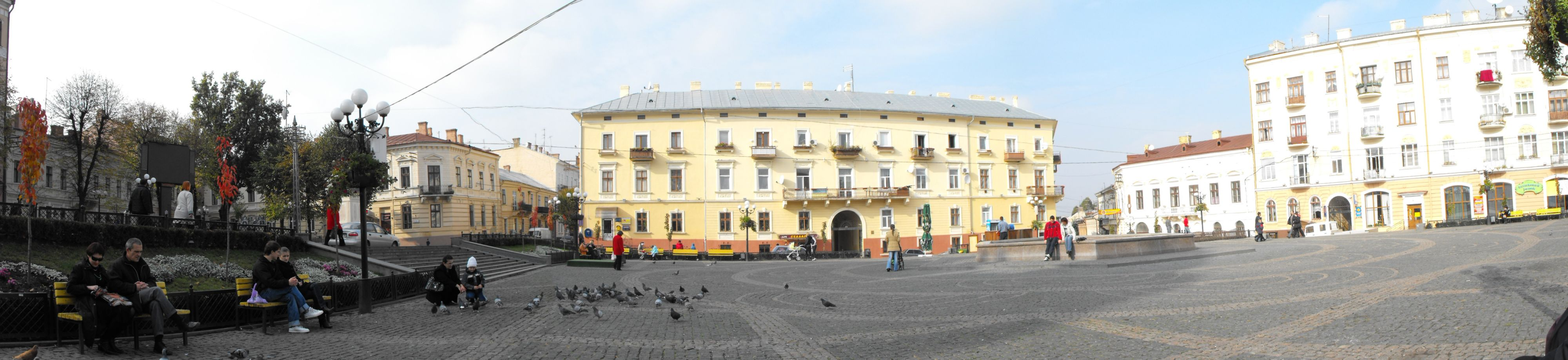 Piata din fata hotelului Bristol din Cernauti